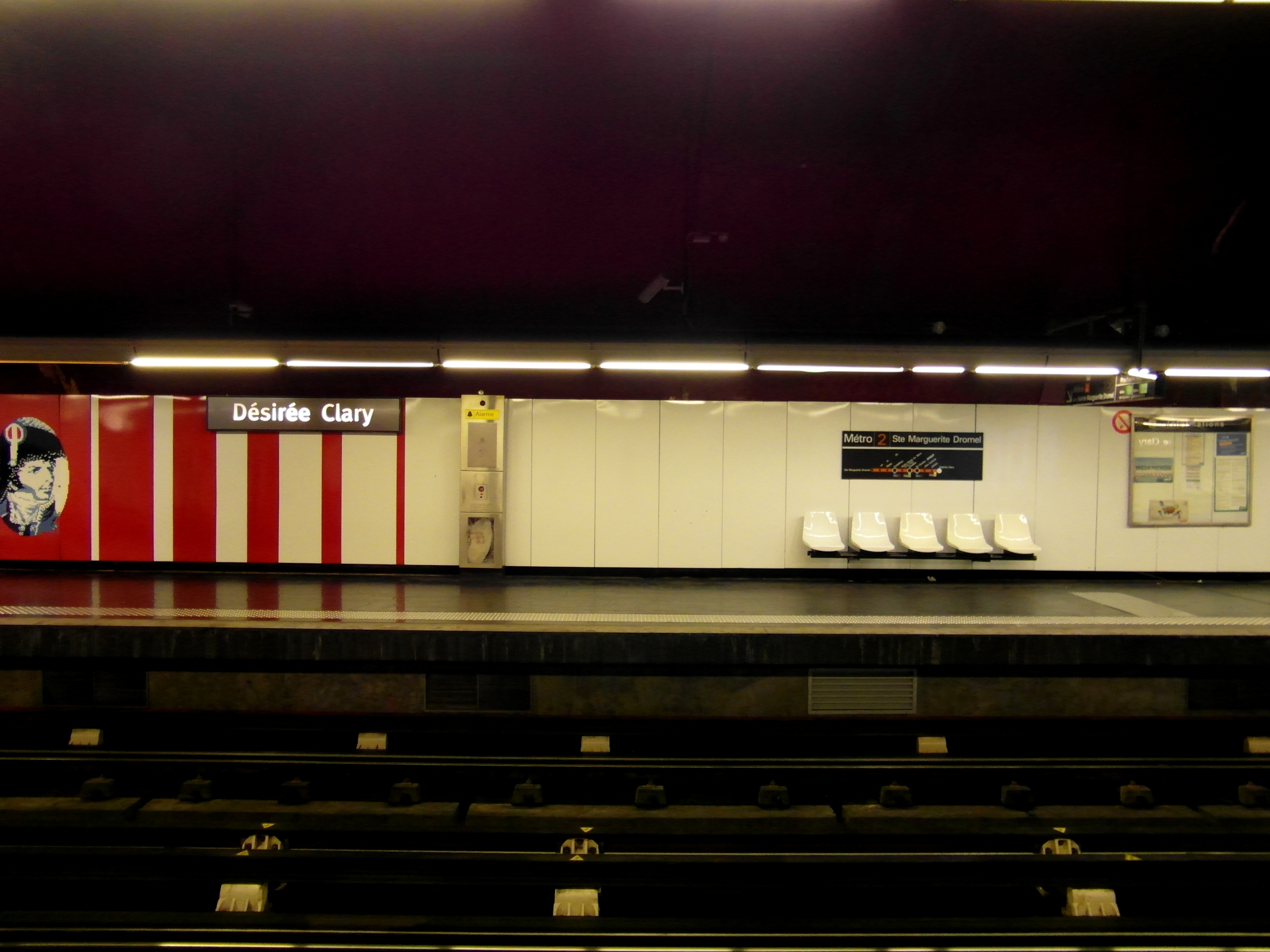 Marseille - Métro - Desirée Clary